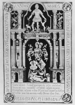 Renaissance-Bodenplatte, Epitaph für Ernst van Goslinga zu Hallum (gestorben 1558 durch Sturz vom Pferd) und seiner Ehefrau Syts van Donia (gestorben 1571), in der St. Martinskirche zu Hallum